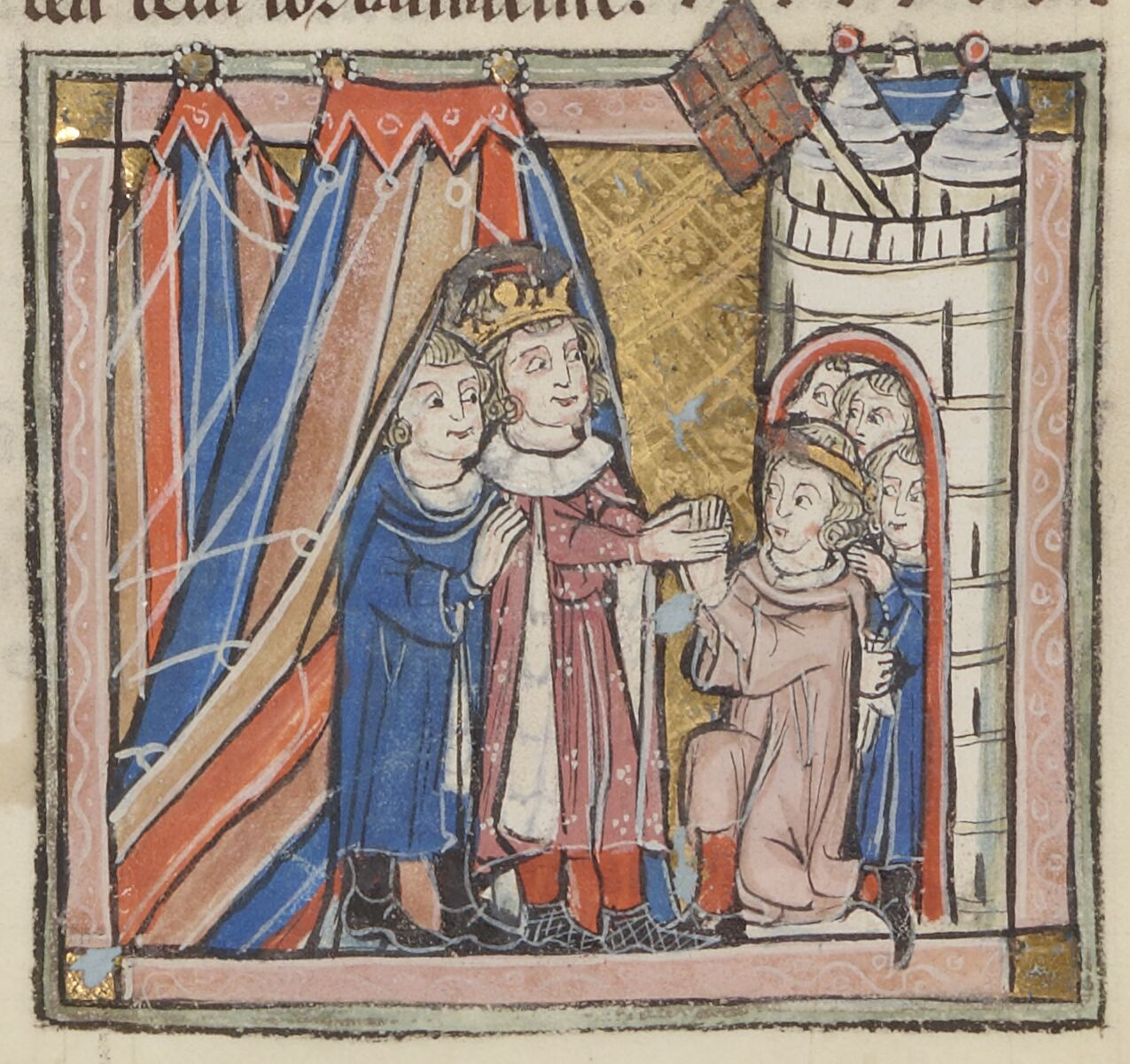 Arrivée de Jean Comnène à Antioche in Historia (guillaume de tyr)